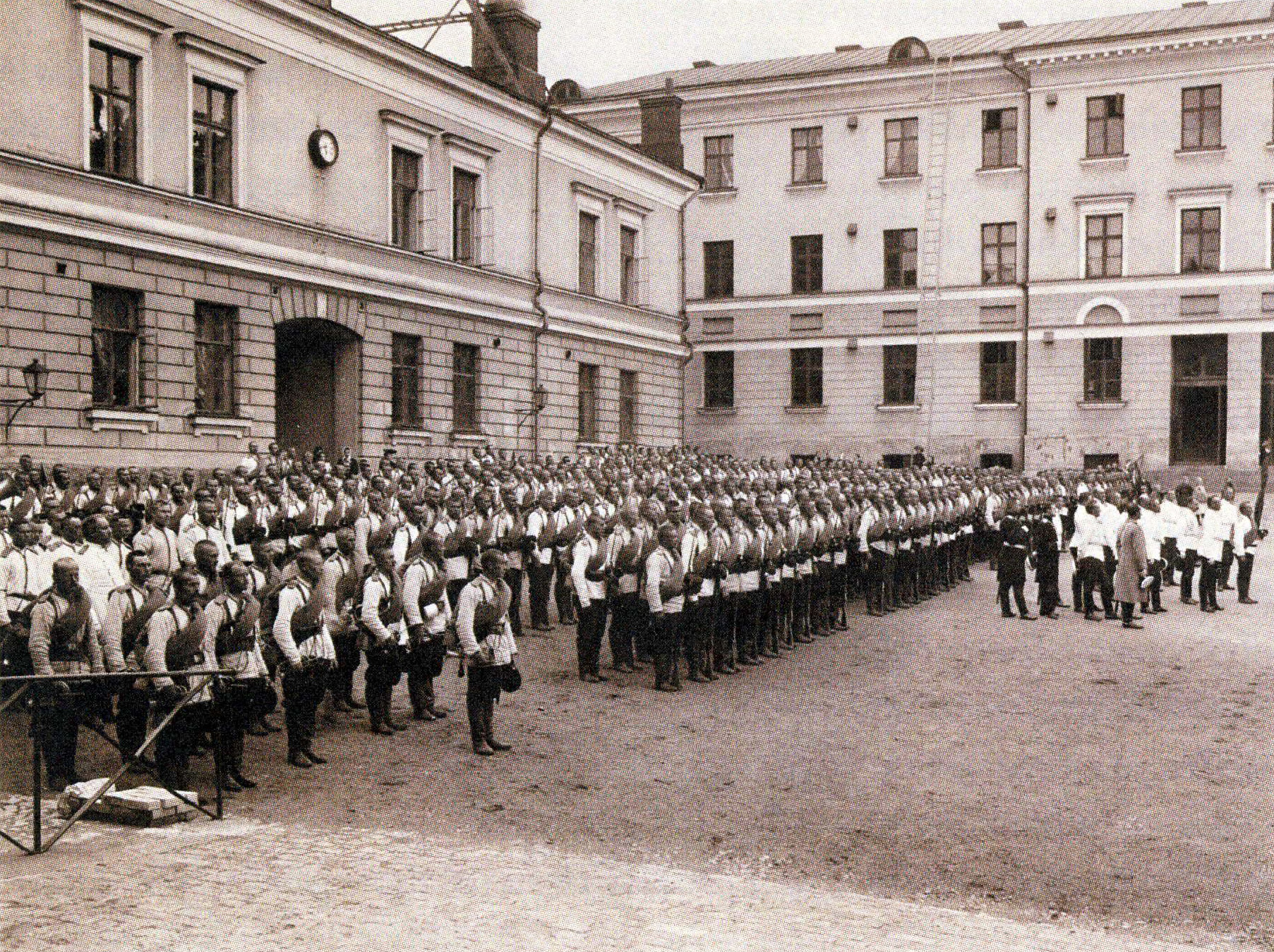 Suomen kaarti kokoontuneena aamurukoukseen Kaartin kasarmin pihalle ennen lähtöään viimeistä kertaa Krasnoje Selon sotaharjoituksiin.